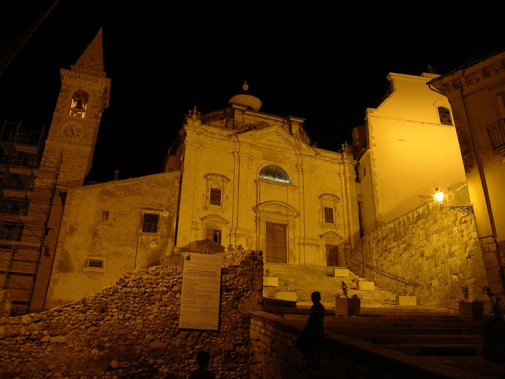 Popoli